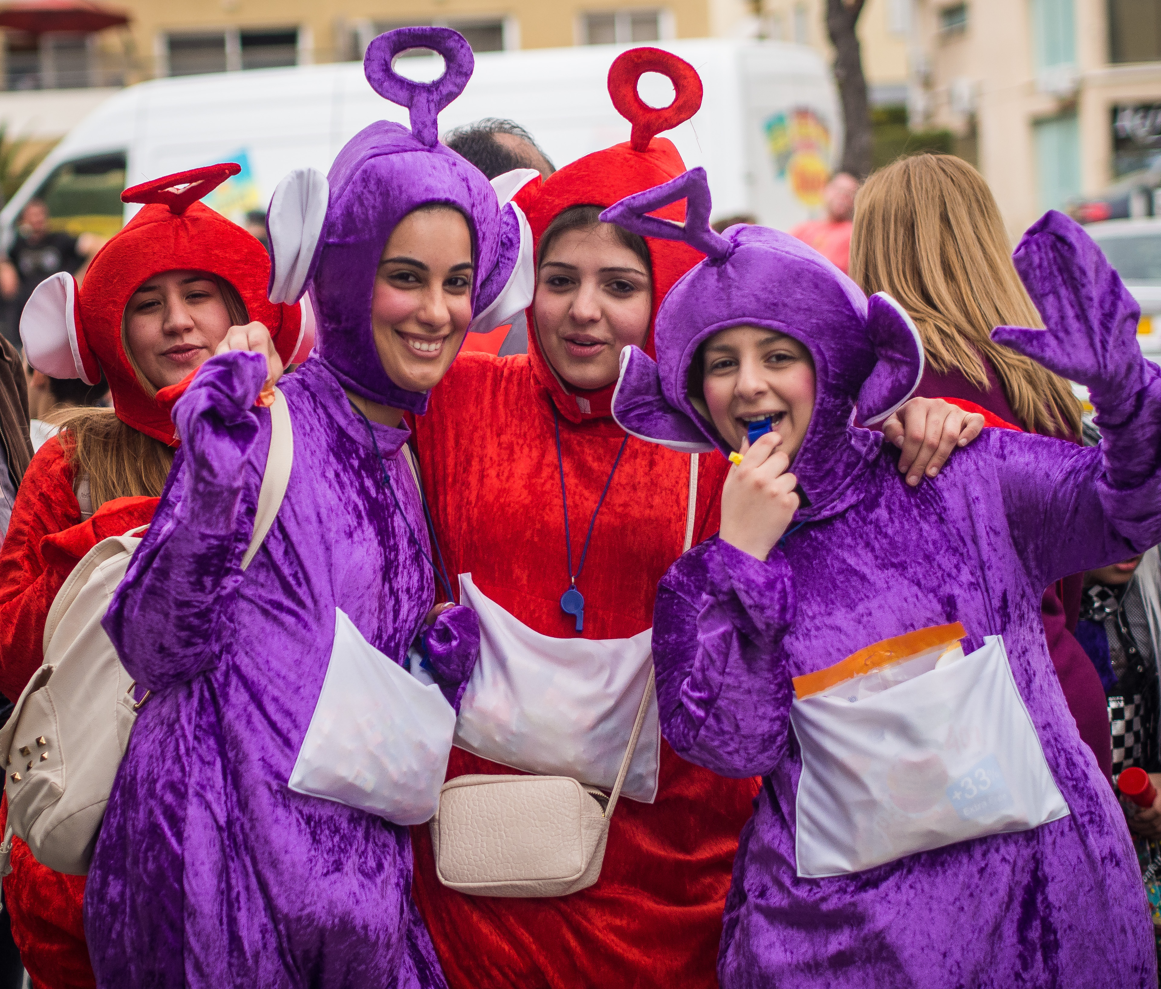 Carnival in Limassol 2014